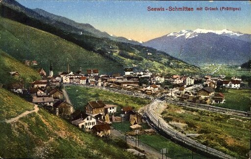 Seewis-Schmitten, alte Ansichtskarte